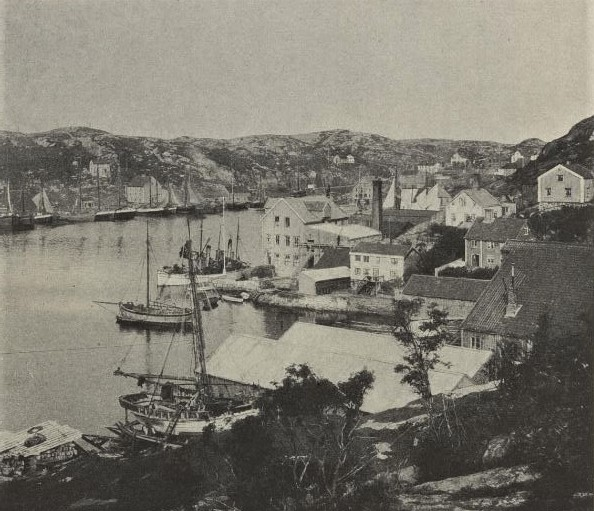 Aktiesmørfabriken Goma i Kristiansund.